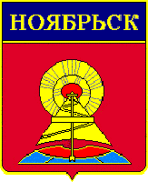 Герб города Ноябрьск (ЯНАО), 1989 год.